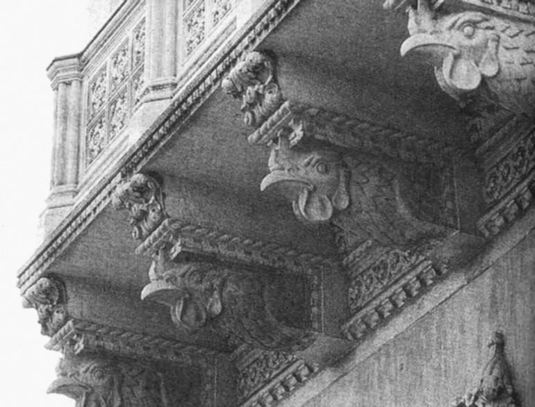 ปูนปั้นรูปหัวไก่ ประดับอยู่ตรงชายคารับพื้นระเบียงของอาคารภายในตึกไทยคู่ฟ้า ทำเนียบรัฐบาล